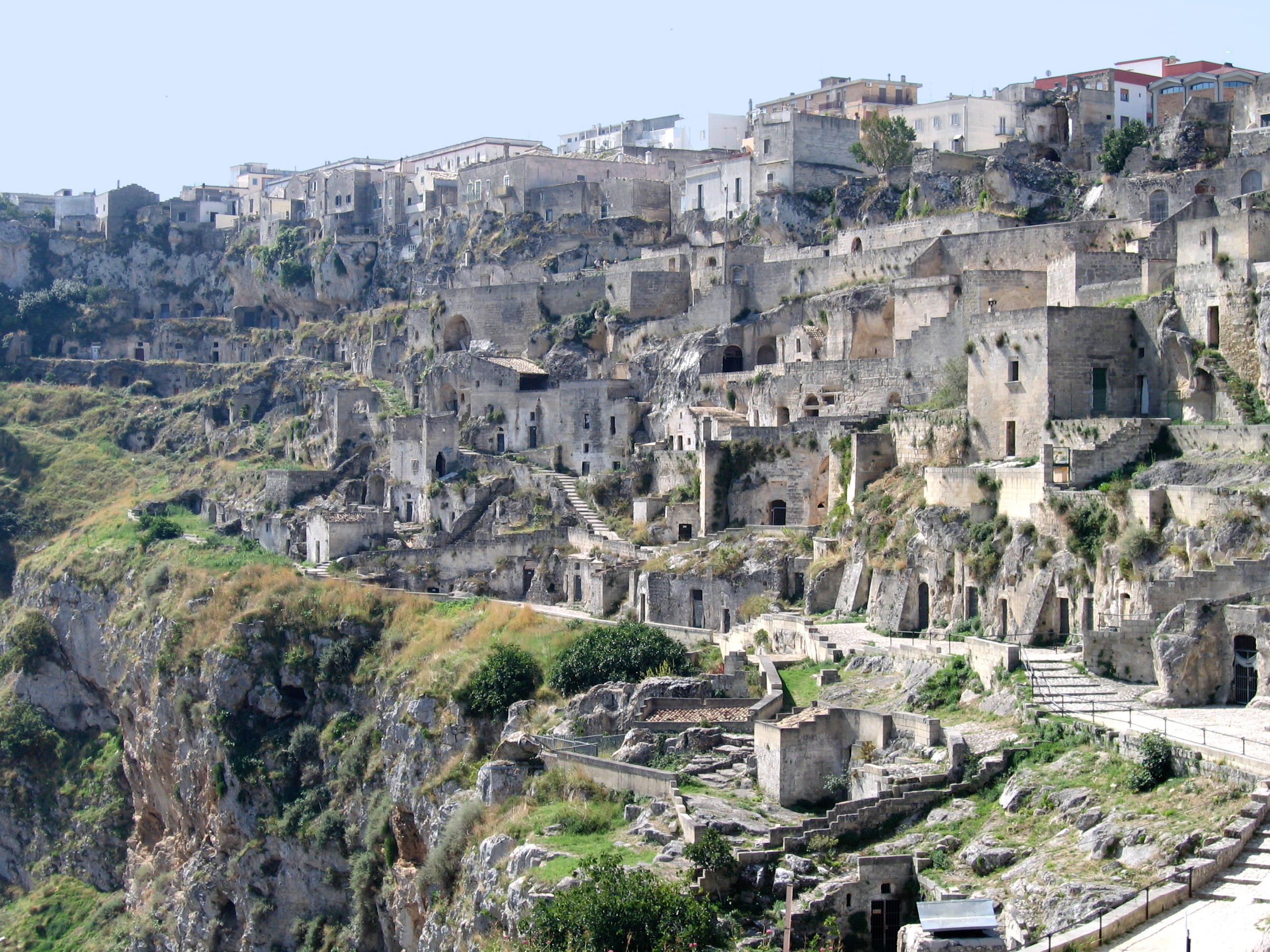 Vu d'ensemble du "Sasso", le site calcaire de Matera (Pouilles, Italie) dans lequel sont creusées des habitations troglodytes source personnelle : photo de vacances Dominique grassigli